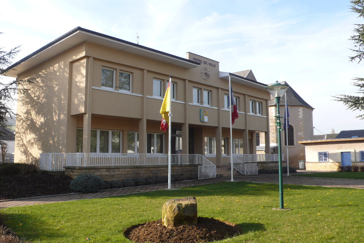 Gemeng Volmérange.